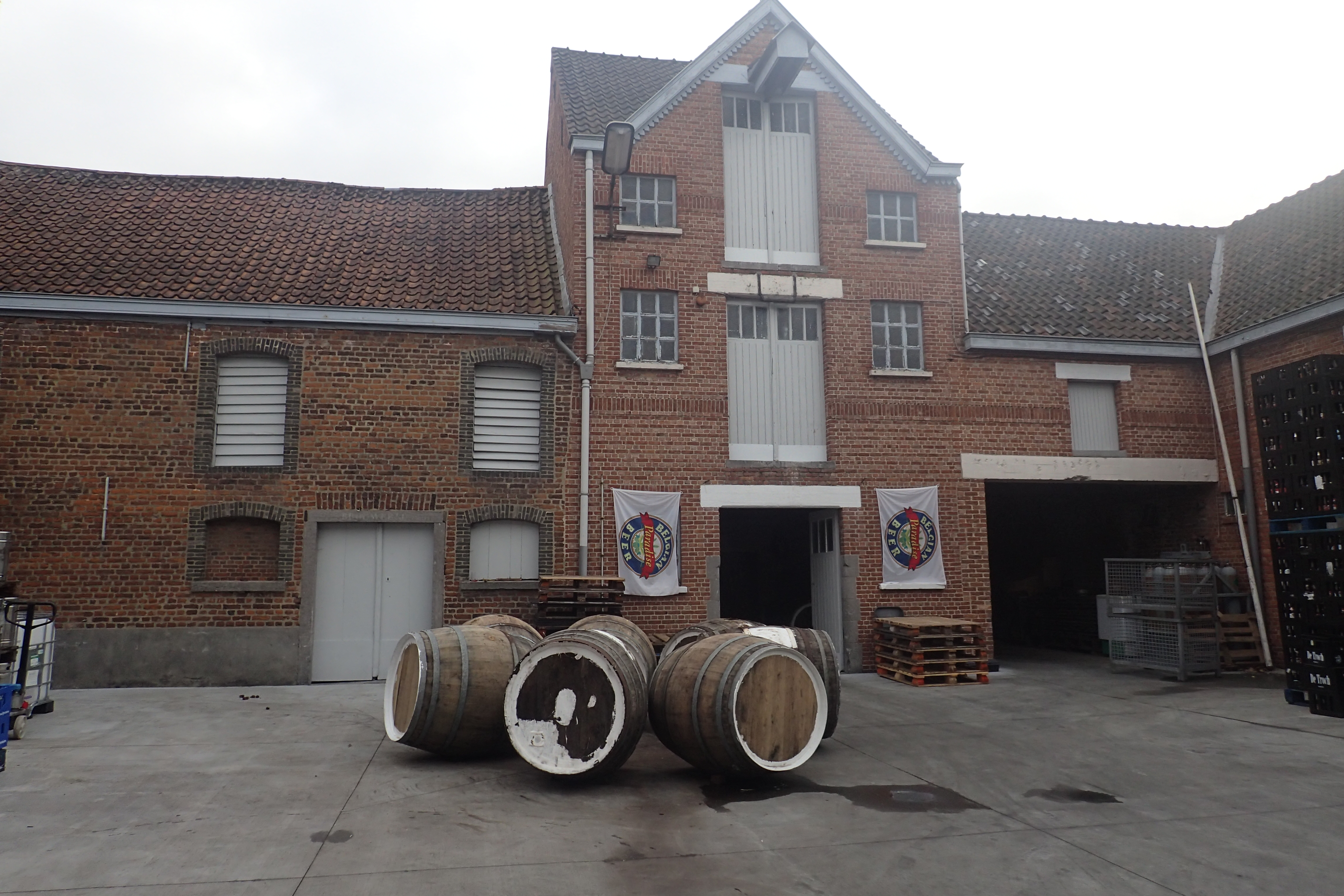 Zicht op de binnenkoer van brouwerij De Troch